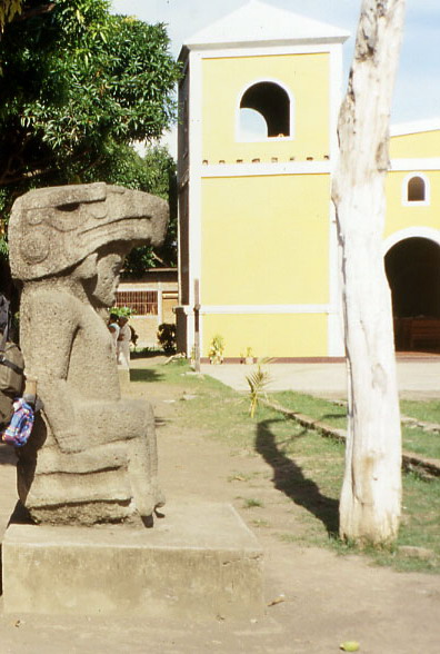 Parque de esculturas junto a la iglesia de Altagracia Parque de esculturas junto a la iglesia de Altagracia. Ometepe (2002)